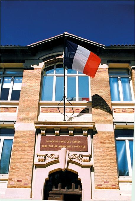 Vue centrale du bâtiment principal de l'école du Pharo en 2010